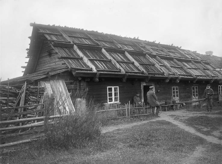 Pavadinimas: en A Liv homestead in Jaunciems, 1902. Data: 1902 Šaltinis: LIV CULTURE Autorius: Axel Olai Heikel